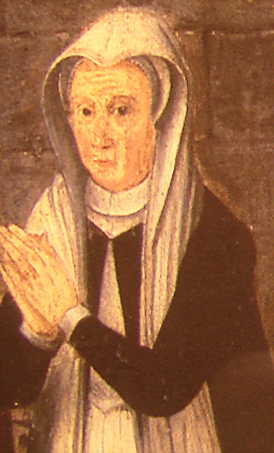 Beate Clausdatter Bille (1526-1605), adelsdame og hofmesterinde, afbildet på familieepitafium i Kågerød Kirke, Skåne, Sverige